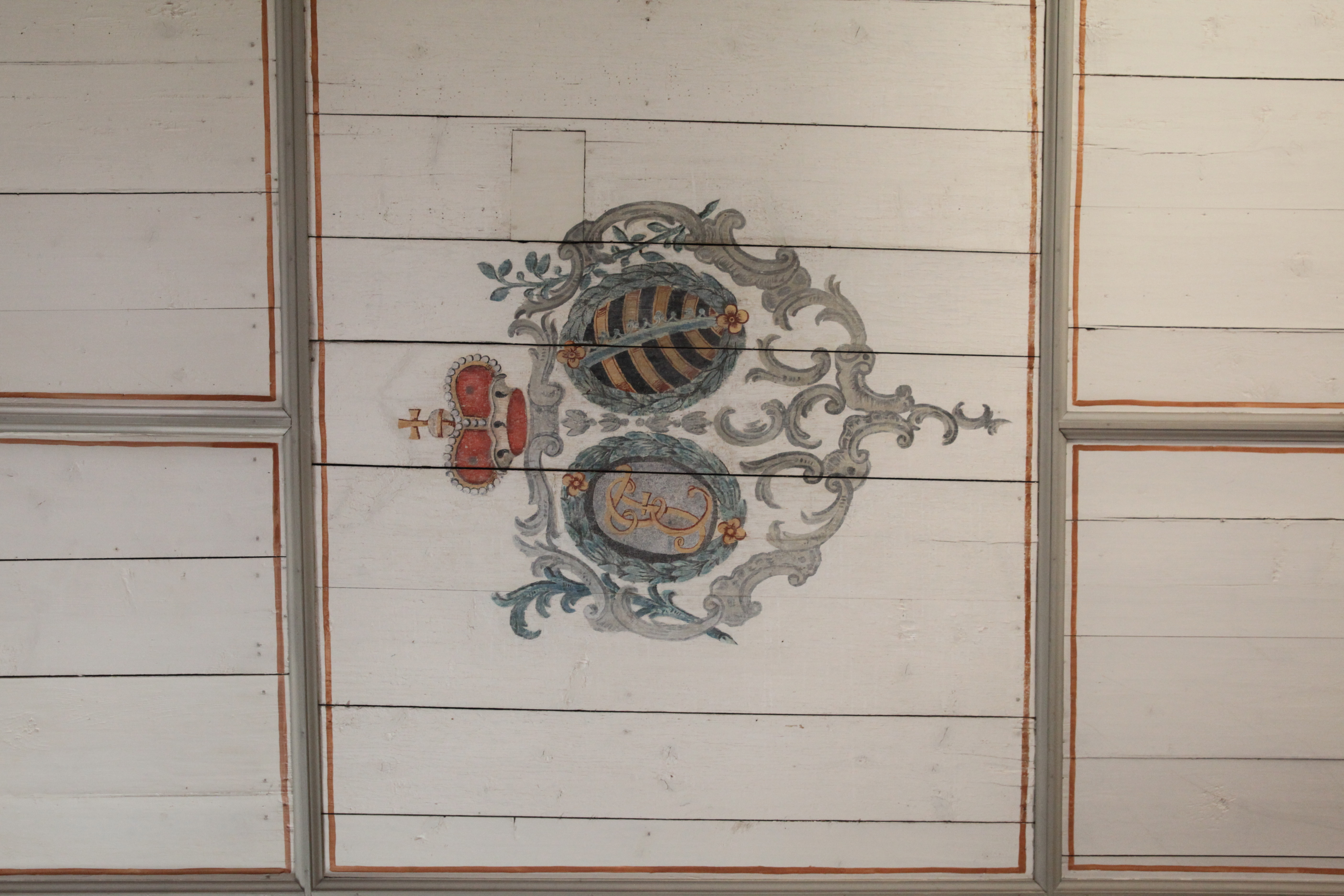 Evangelisch-lutherische Filialkirche in Beuerfeld